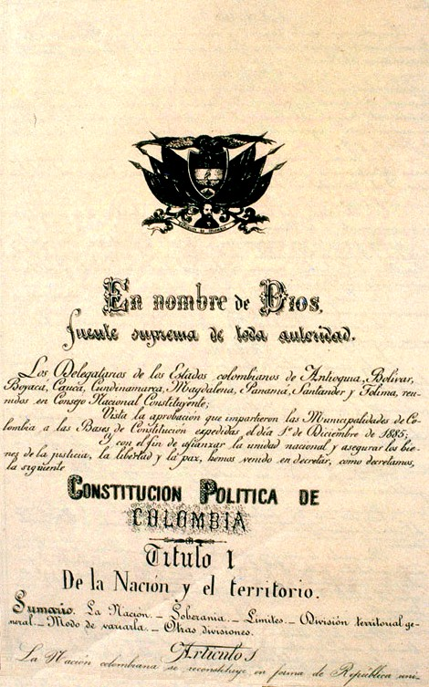 Constitución política de Colombia de 1863